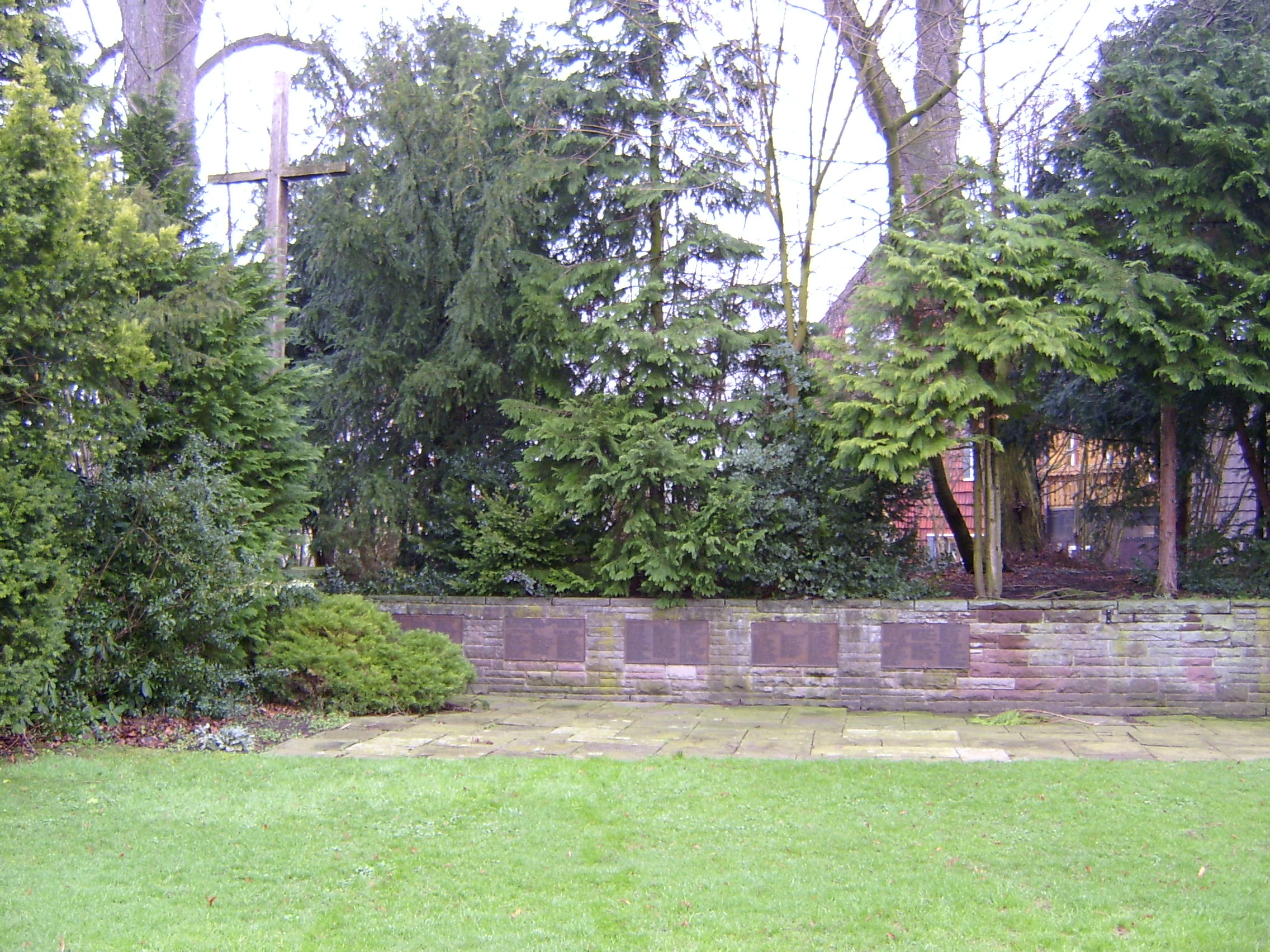 Gedenkstätte für die aus Badenhausen stammenden Opfer der beiden Weltkriege. Auf den fünf Tafeln befinden sich die Namen der gefallenen und bis heute vermissten Soldaten.